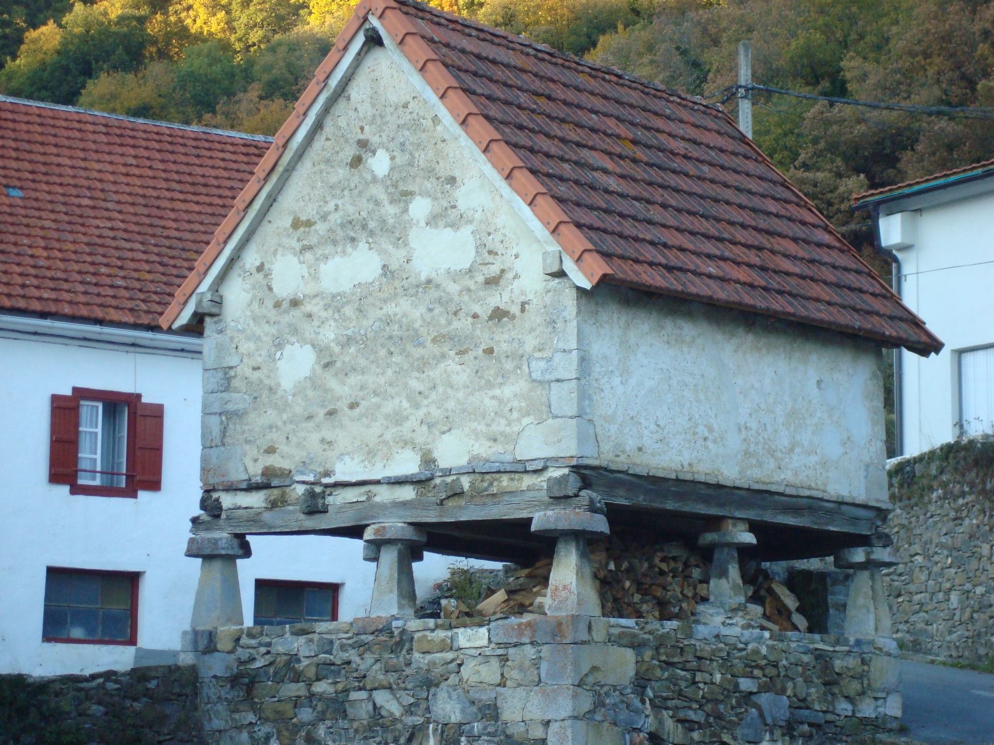 En Aribe (Navarra). España.